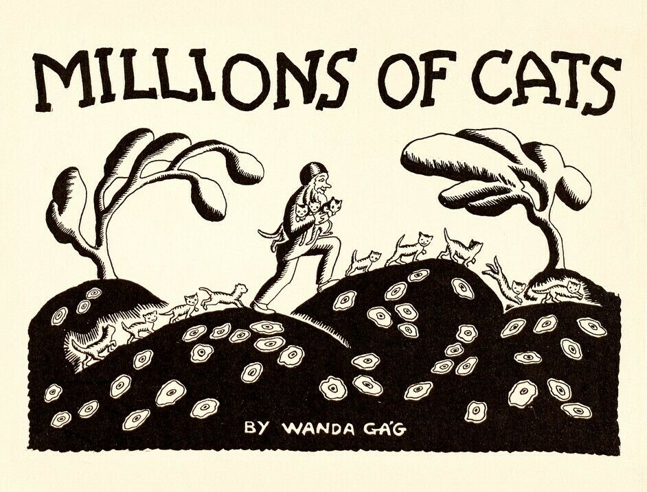 Illustration tirée de "Des chats par millions" par Wanda Gág.